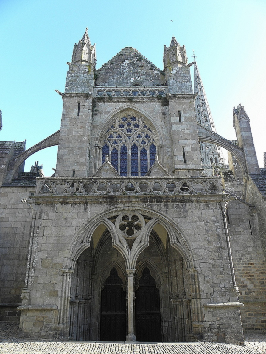 Façade occidentale de la cathédrale Saint-Tudgual de Tréguier (22). .